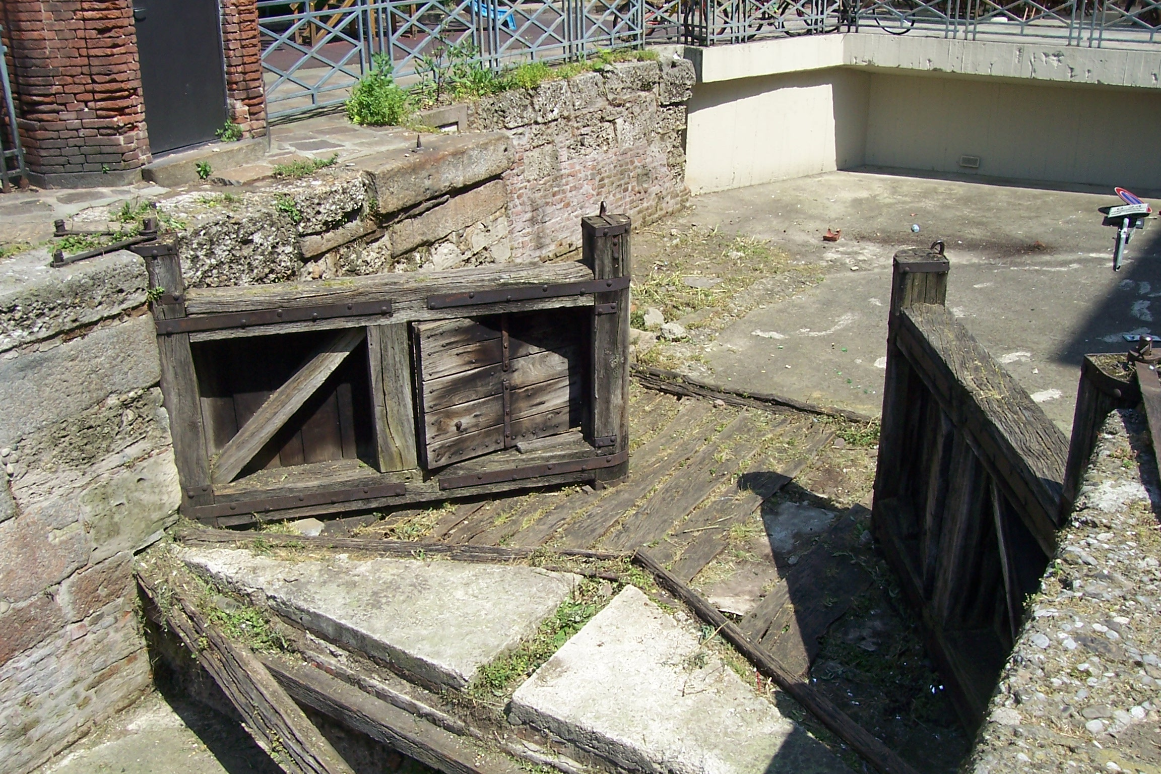 Il rudere della Porta a monte della conca dell'Incoronata (2010)